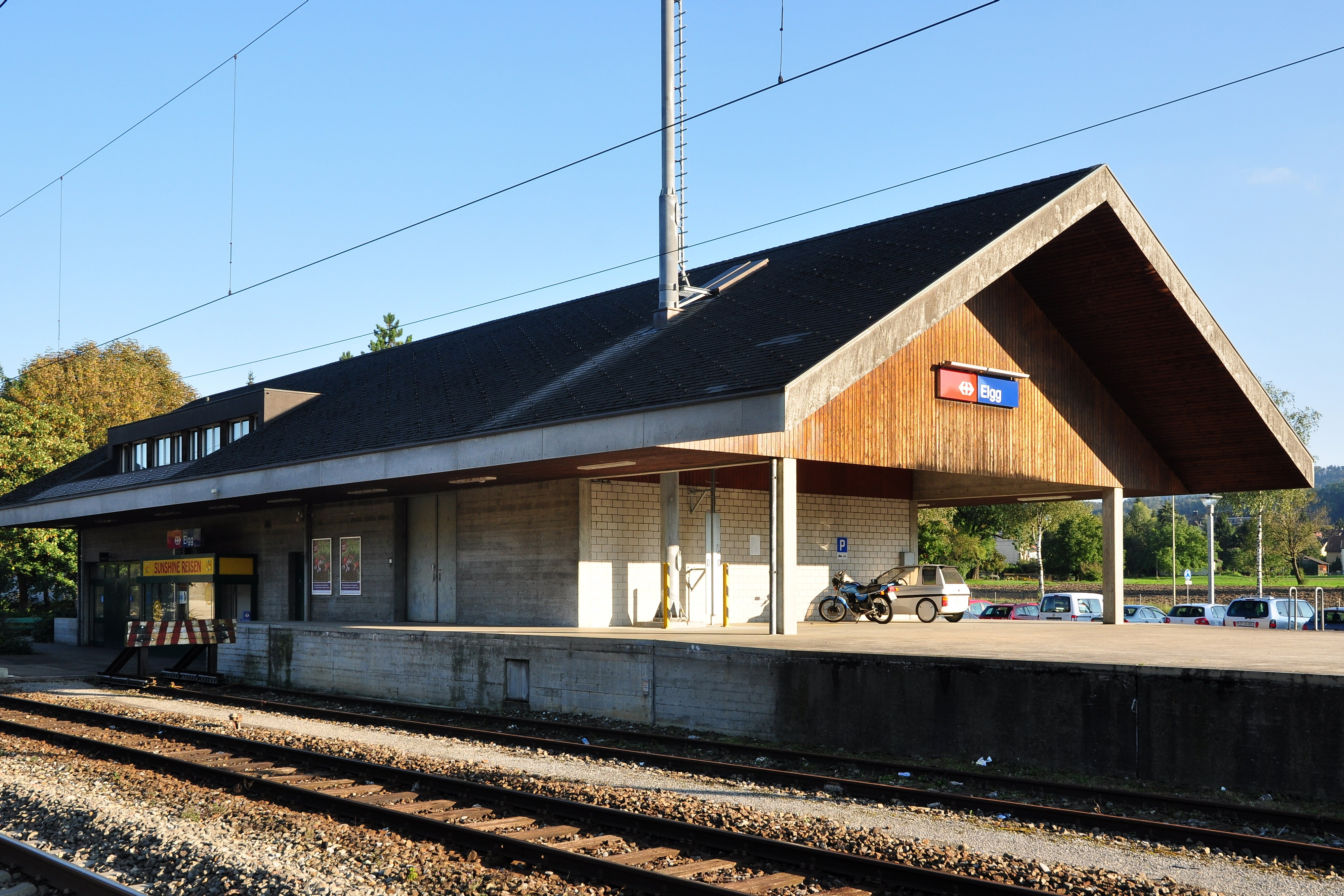 Elgg (Switzerland)